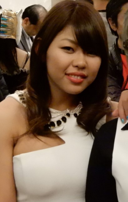 スターダムアワード 葉月